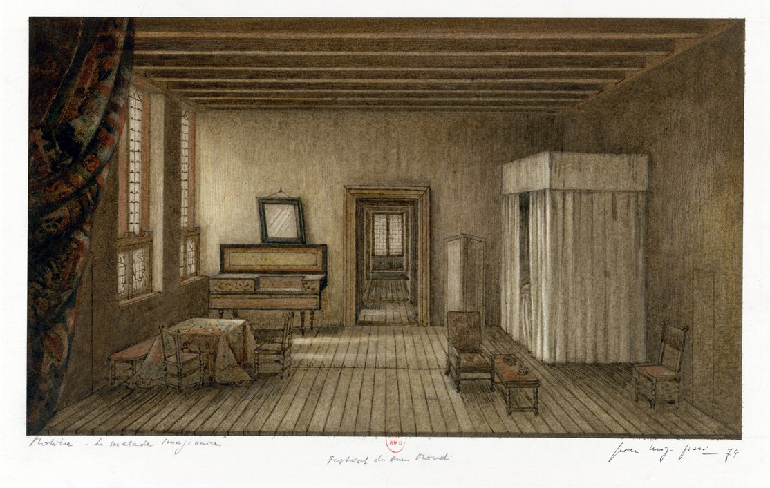 Le Malade imaginaire-Festival dei due Mondi : maquette de décor.